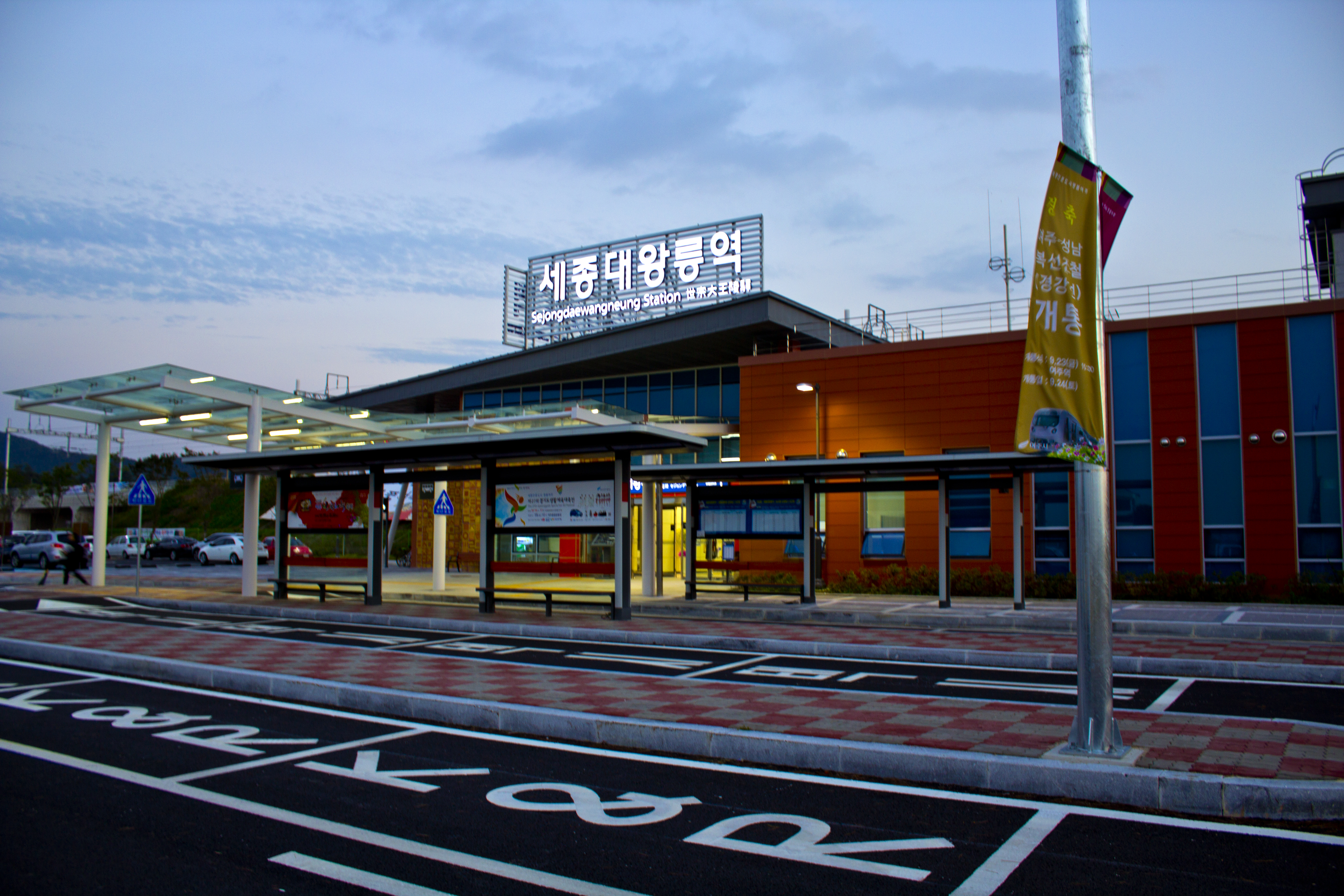 경강선 세종대왕릉역 전경